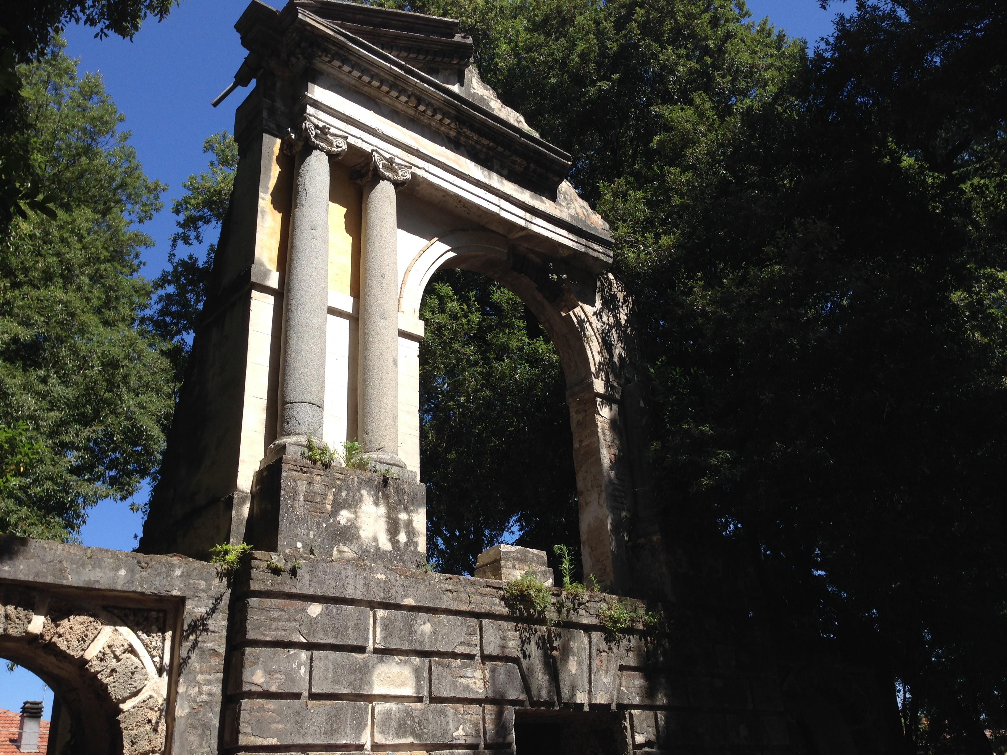 Villa Redenta. Spoleto. Parte superiore della "frons scenae" del teatro